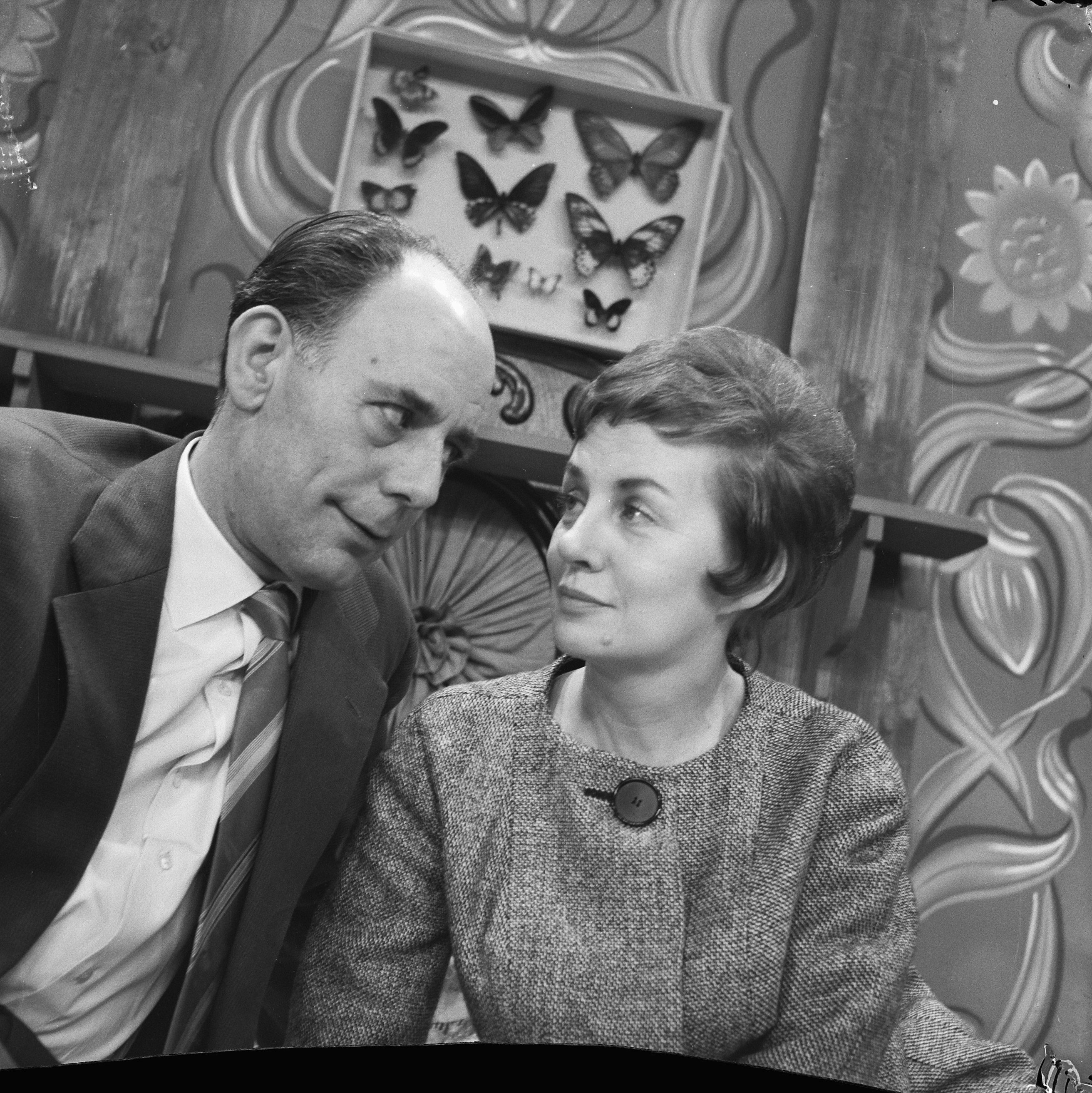 Collectie / Archief : Fotocollectie Anefo Reportage / Serie : [ onbekend ] Beschrijving : Televisiespel "Reizigers zonder bagage", Han Bentz van den Berg en Andrea Domburg Datum : 8 februari 1961 Trefwoorden : Televisiespellen Persoonsnaam : Bentz van den Berg, Hans, Domburg, Andrea Fotograaf : Nijs, Jac. de / Anefo Auteursrechthebbende : Nationaal Archief Materiaalsoort : Negatief (zwart/wit) Nummer archiefinventaris : bekijk toegang 2.24.01.03 Bestanddeelnummer : 912-0743 Reacties Geplaatst door Televisiespel liefhebber op 23 september 2017 - 01:17. AVRO Televisie. Televisiespel "Reiziger zonder bagage"